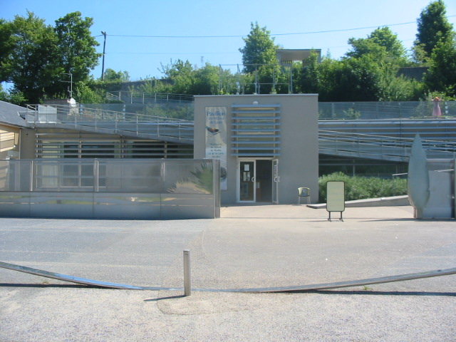 Le pavillon du milieu de Loire, à Pouilly-sur-Loire